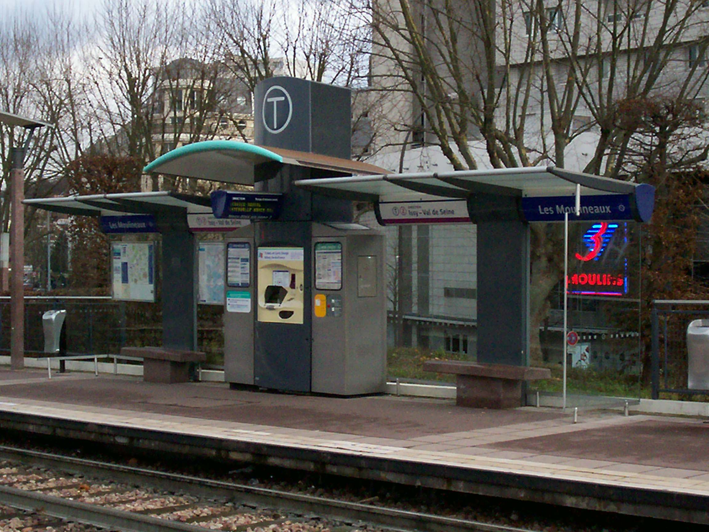 Paris Tramway ligne 2